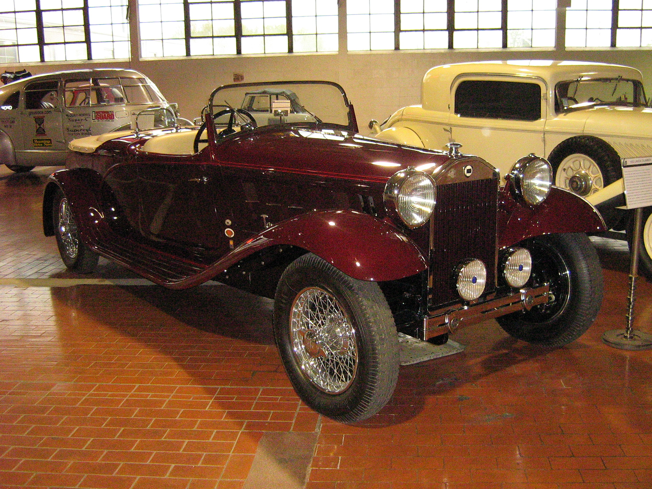 1932 Lancia Dilambda at Lane Motor Museum see more